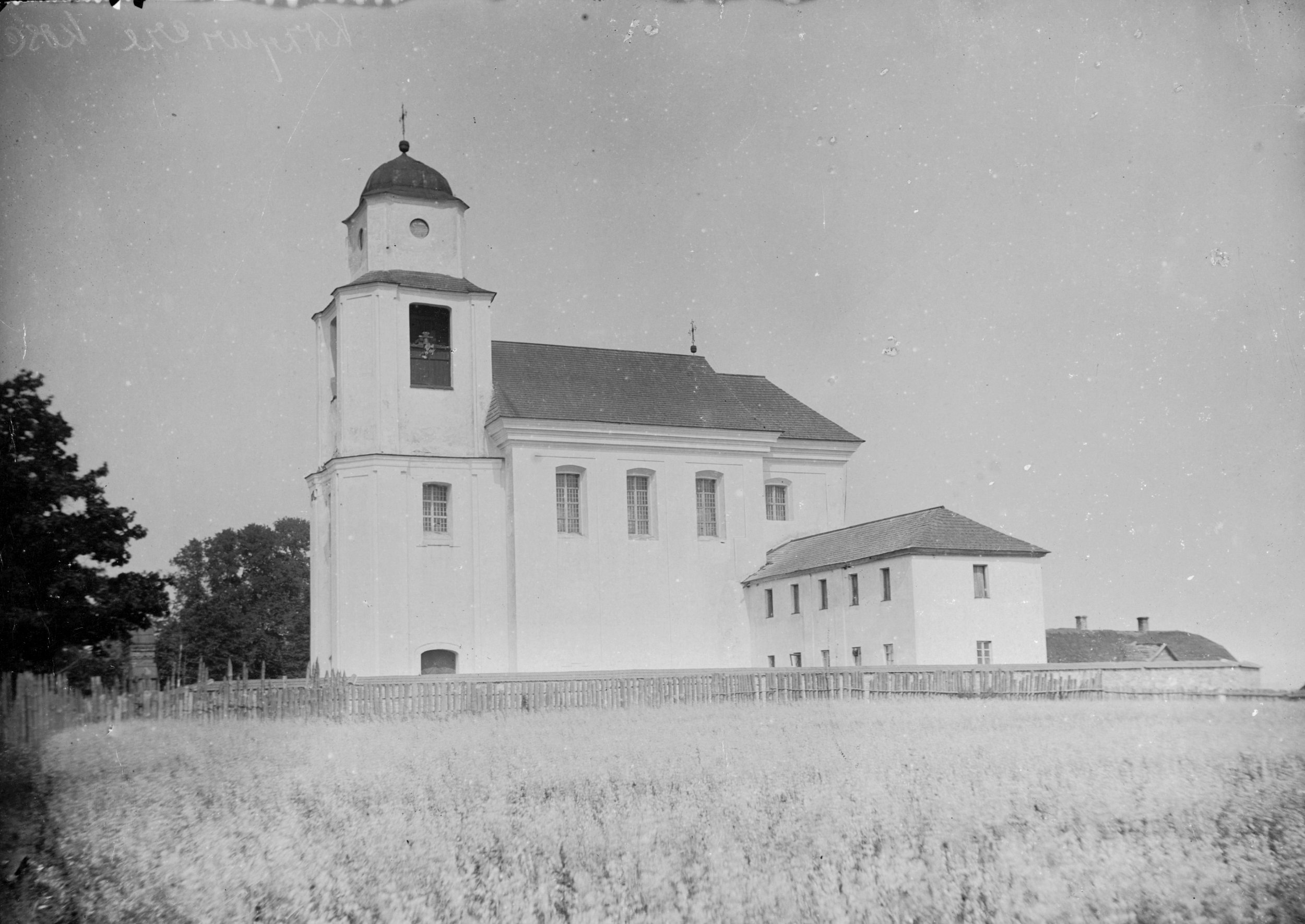 Беларуская (тарашкевіца): Крывічы (Kryvičy). Касьцёл Сьвятога Апостала Андрэя і кляштар трынітарыяў